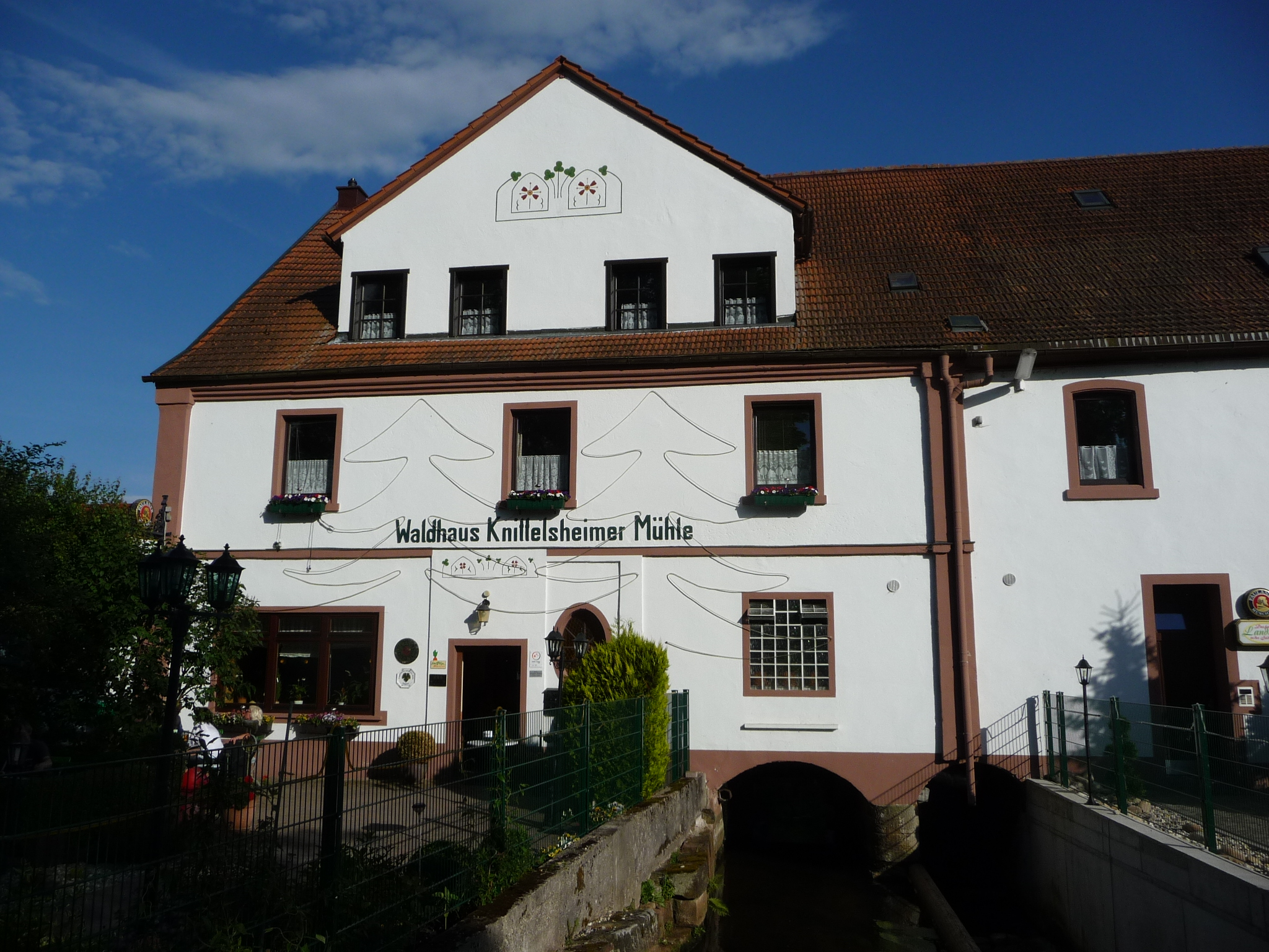 Knittelsheim ist eine Ortsgemeinde im Landkreis Germersheim in Rheinland-Pfalz.